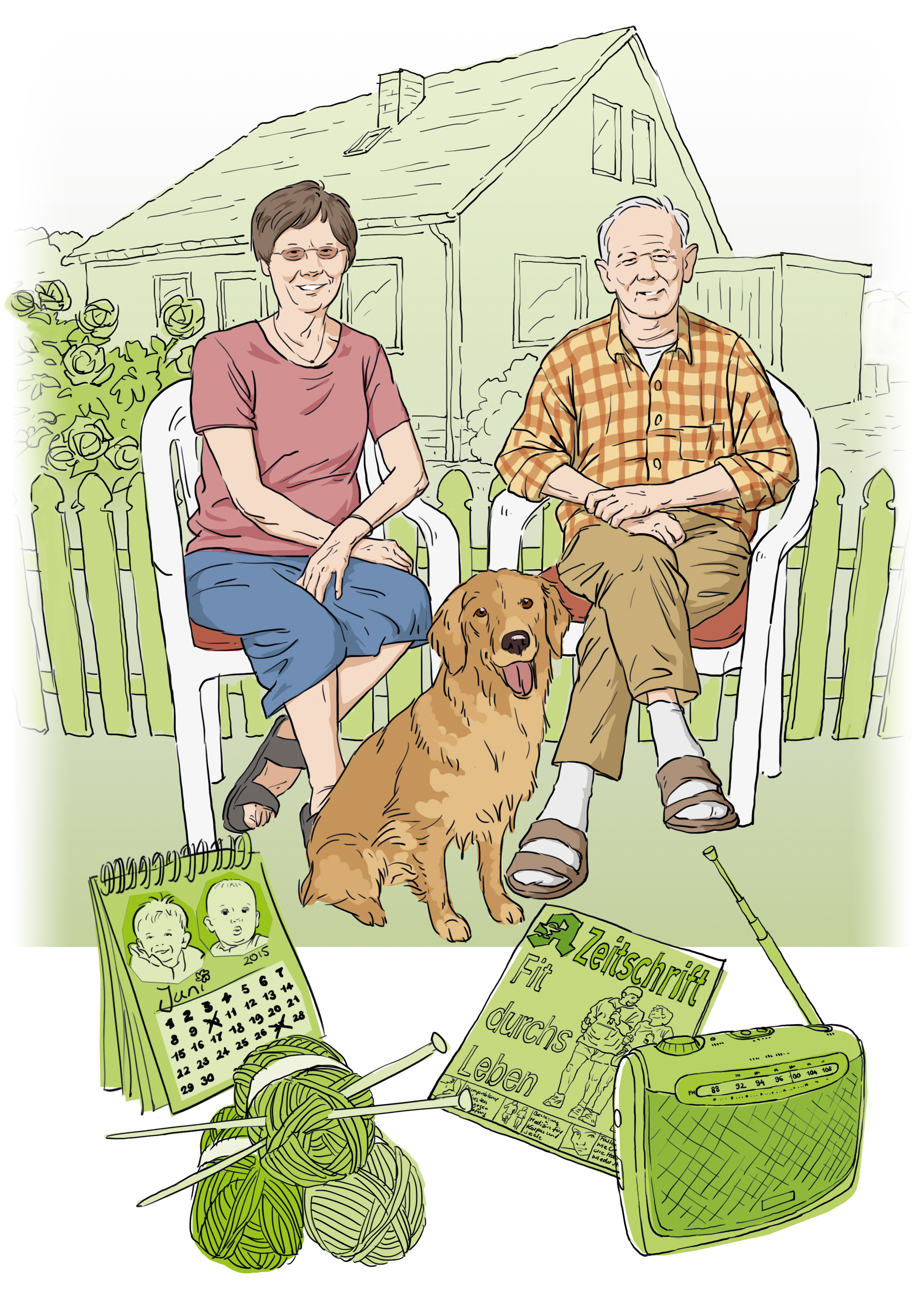 Grafische Darstellung des Typus "Häusliche" aus der ARD-/ZDF-MedienNutzerTypologie. Beispielhafte Aussage: "Um 12 Uhr wird gegessen."